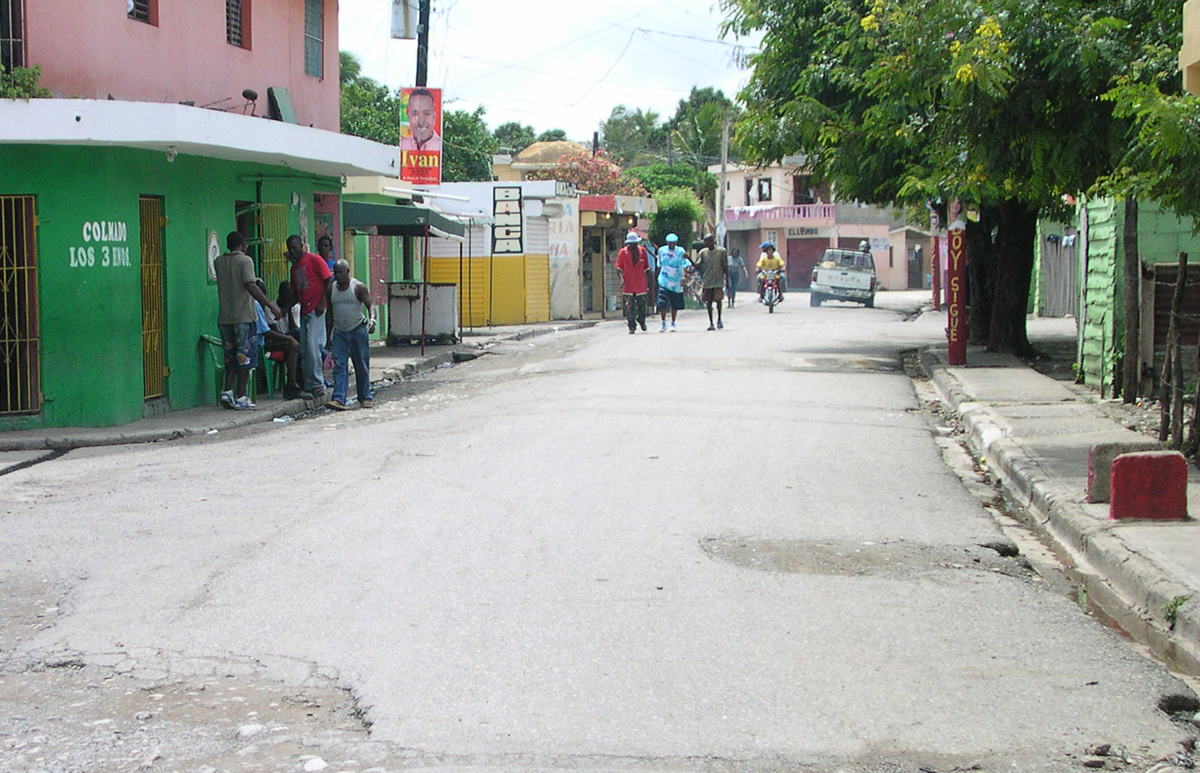 Cinco Esquinas, Don Gregorio